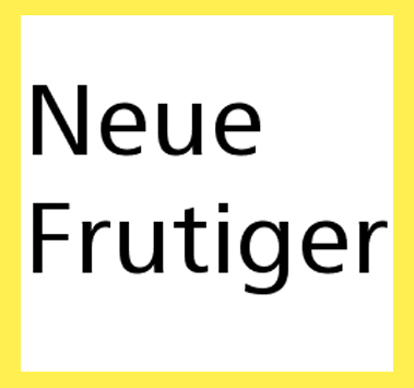 Mostra de Frutiger Neue